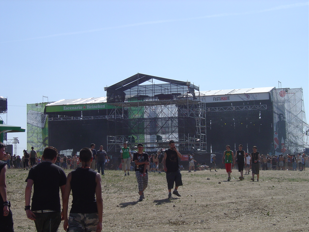 Escenarios principales de Festimad 2005 (Heineken y Festimad Sur)